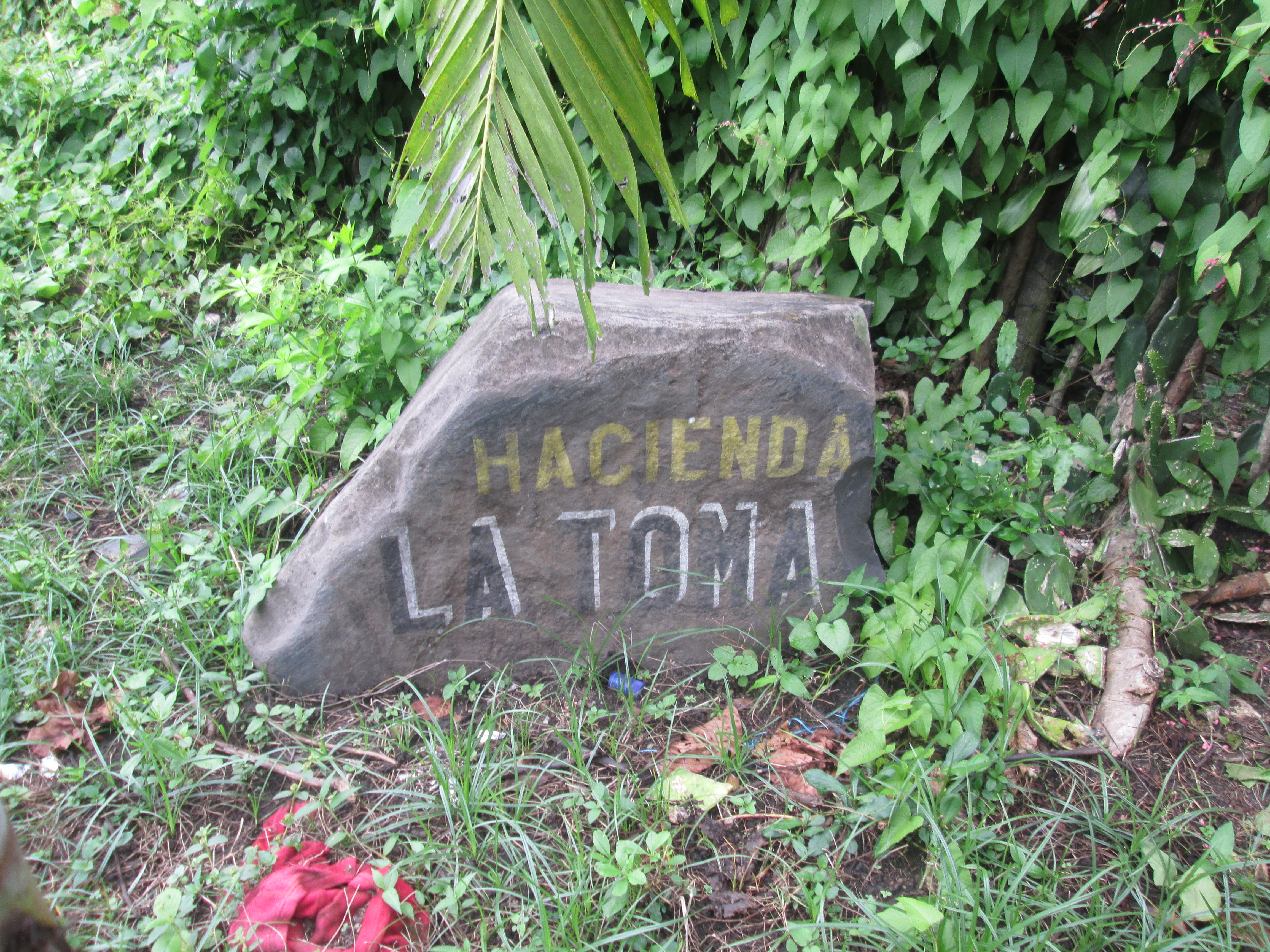 Roca que muestra la entrada de la Hacienda La Toma